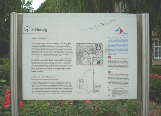 Informationsschild am Wikinger-Friesen-Weg in Schleswig